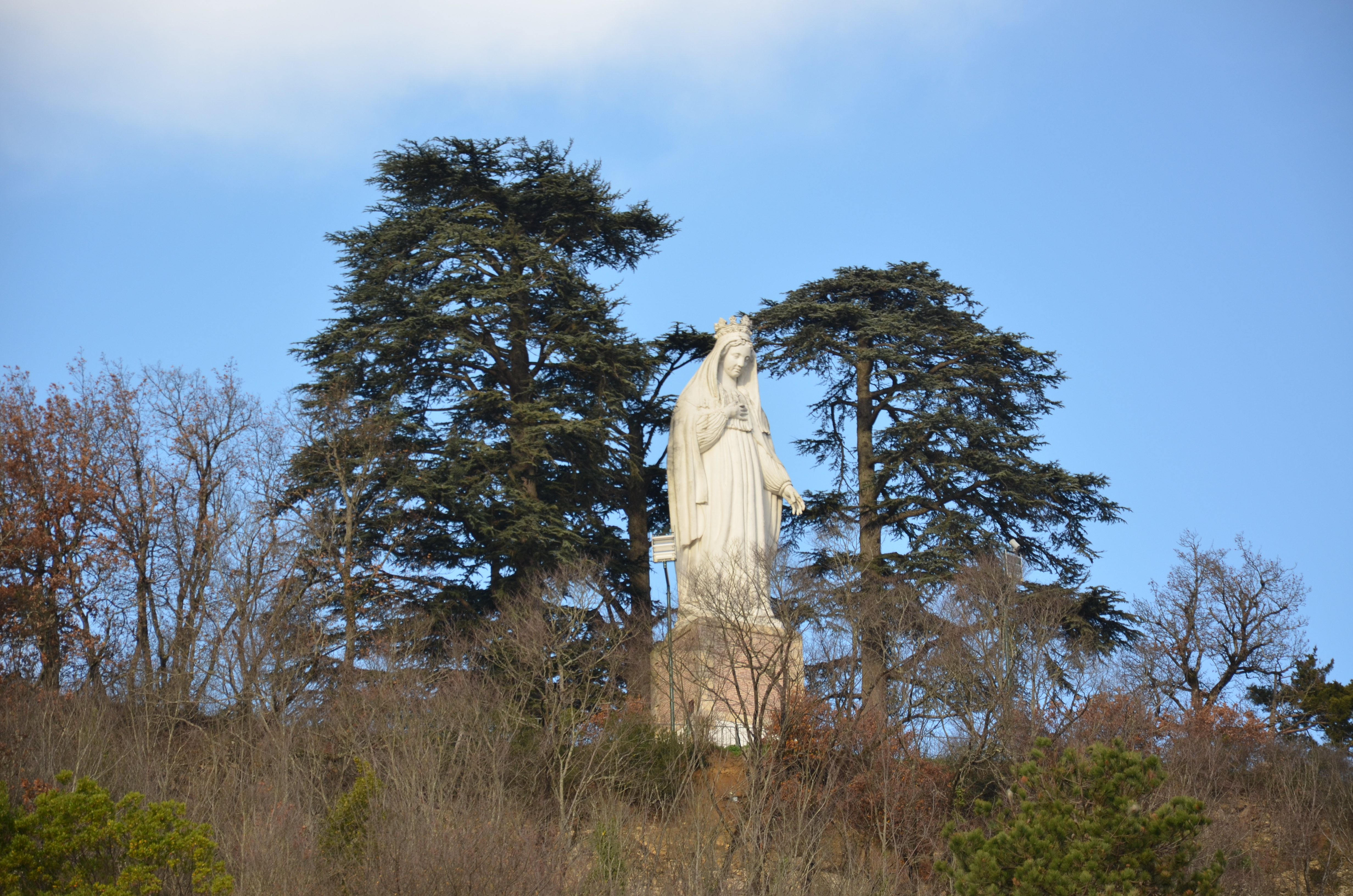 Statut de la Vierge sur les hauteurs de Bon-Encontre (Lot-et-Garonne, France).